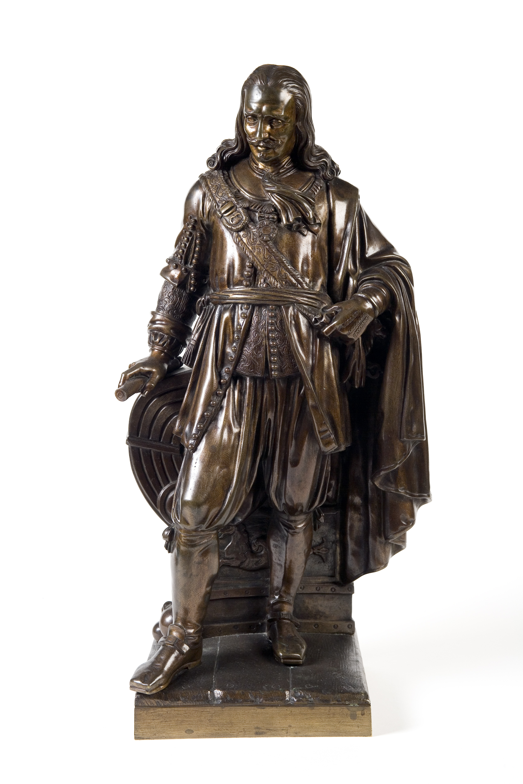 Model van het Nationale standbeeld van M.A. de Ruyter in Vlissingen.